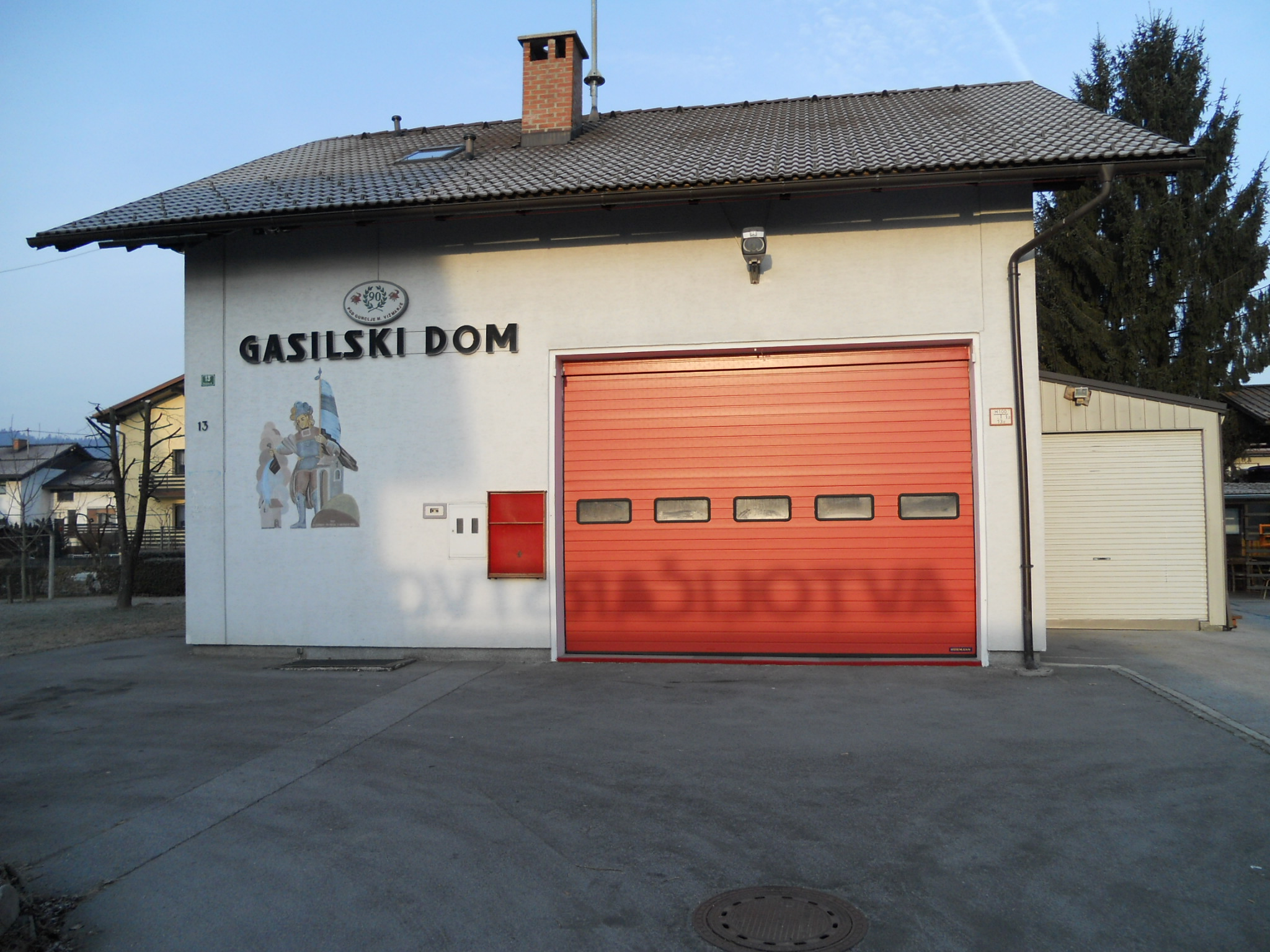 Gasilski dom Gunclje